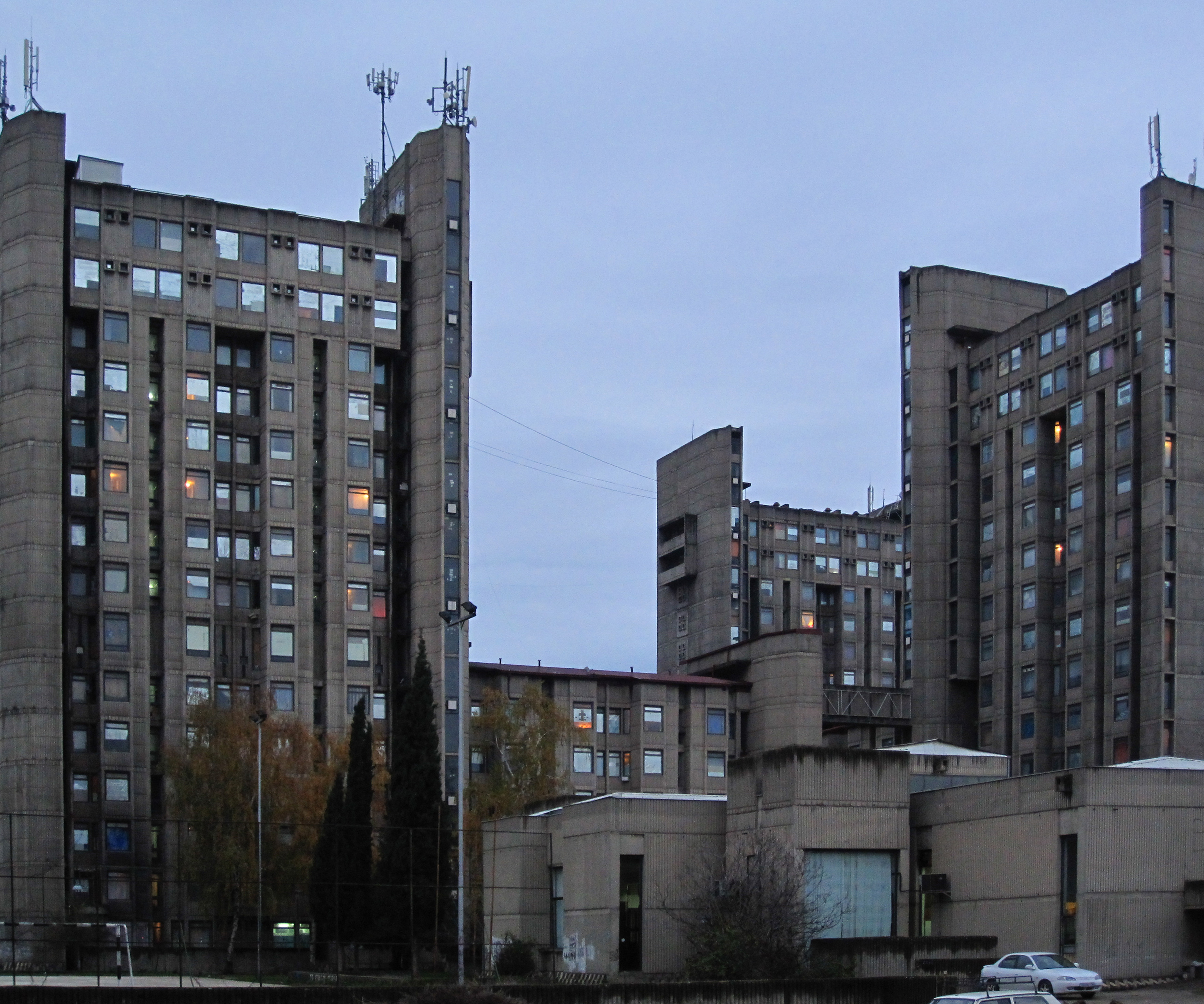 Студентски Дом - Гоце Делчев во Скопје.